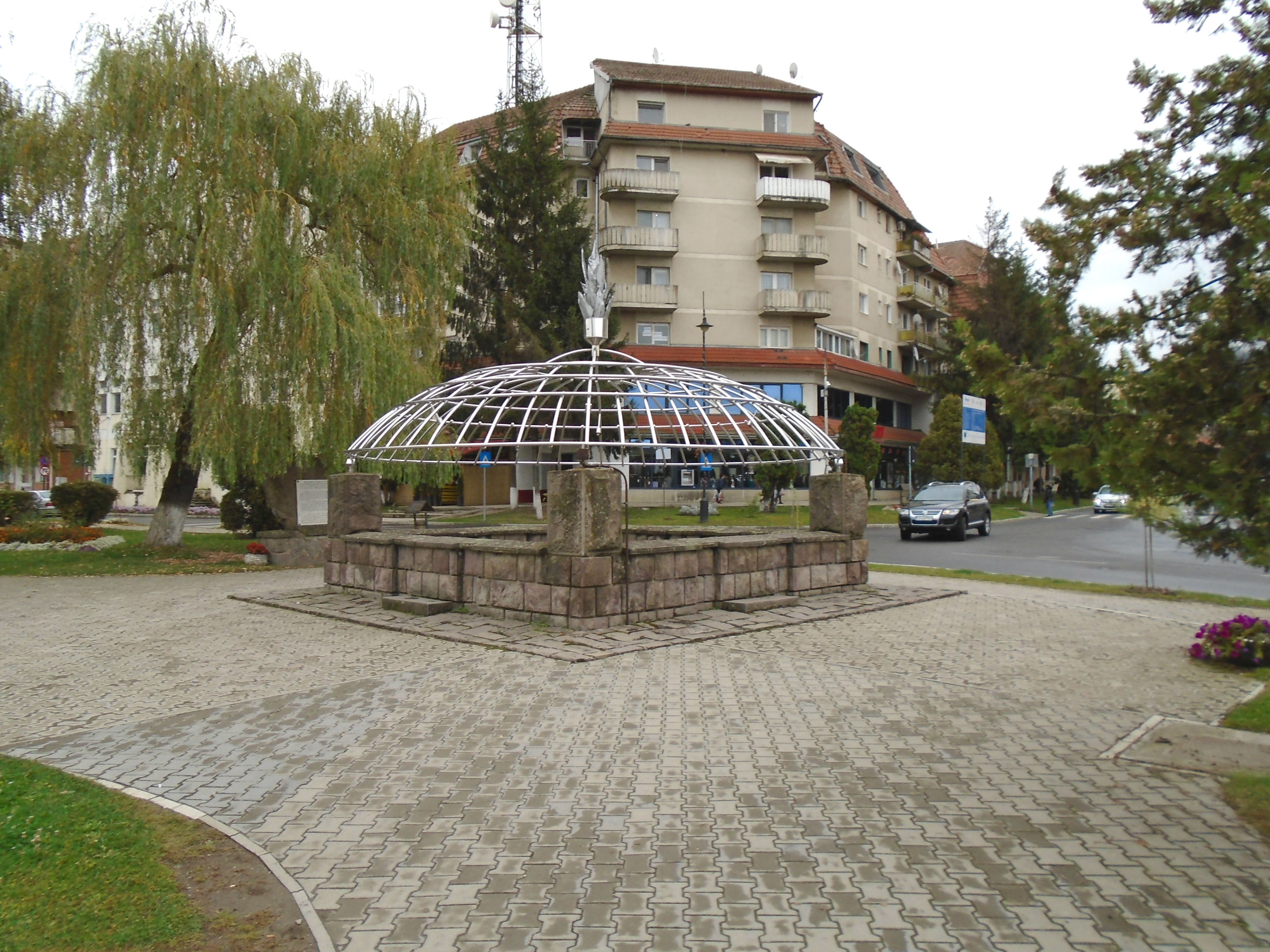 Balta Dracului, Covasna